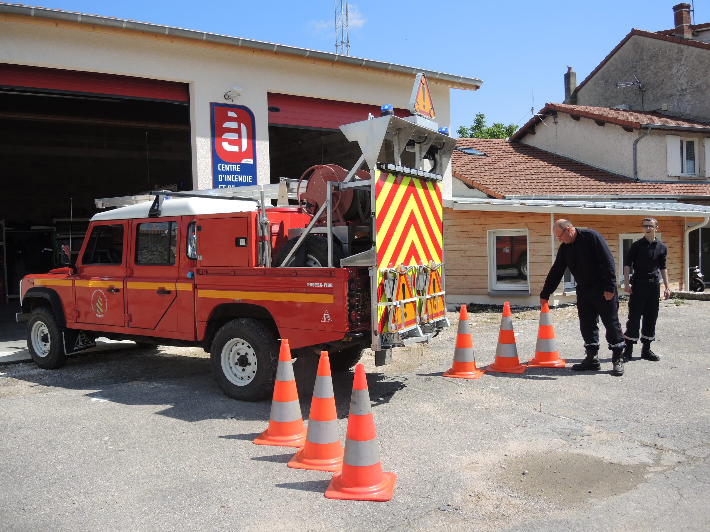 Bogy détail